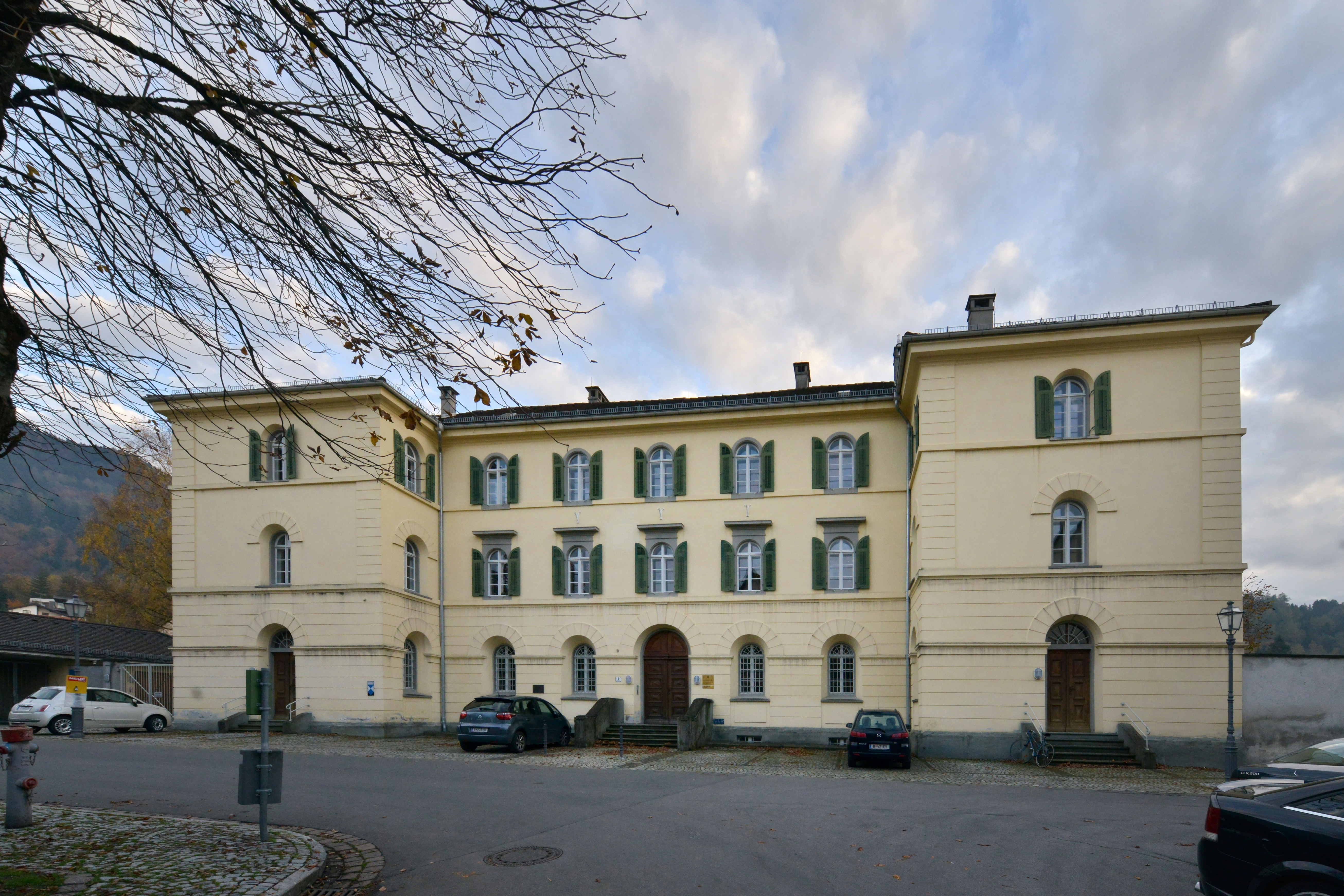 Amtsplatz Nr.:1 in der Oberstadt von Bregenz, Vorarlberg. Das ehemalige Gefängnis ist seit Ende der 1980er-Jahre Sitz des Bundesdenkmalamtes Vorarlberg, 1857-1860 anstelle des "großen Hauses" der Grafen von Bregenz erbaut, kubischer Bau im Rundbogenstil, dreigeschoßig, zwei Seitenrisalite.